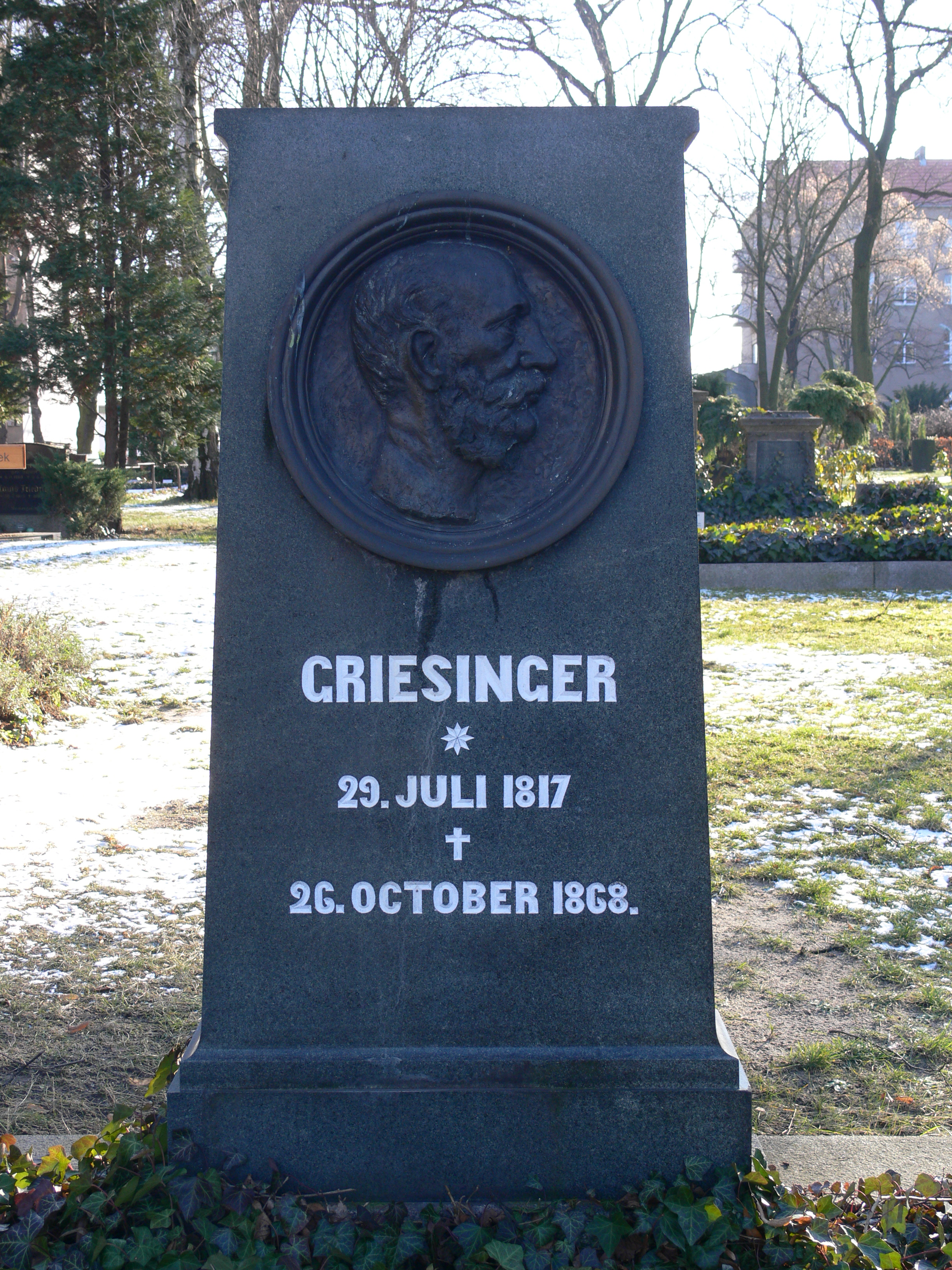 Alter St.-Matthäus-Kirchhof Berlin-Schöneberg Grabstätte Wilhelm Griesinger